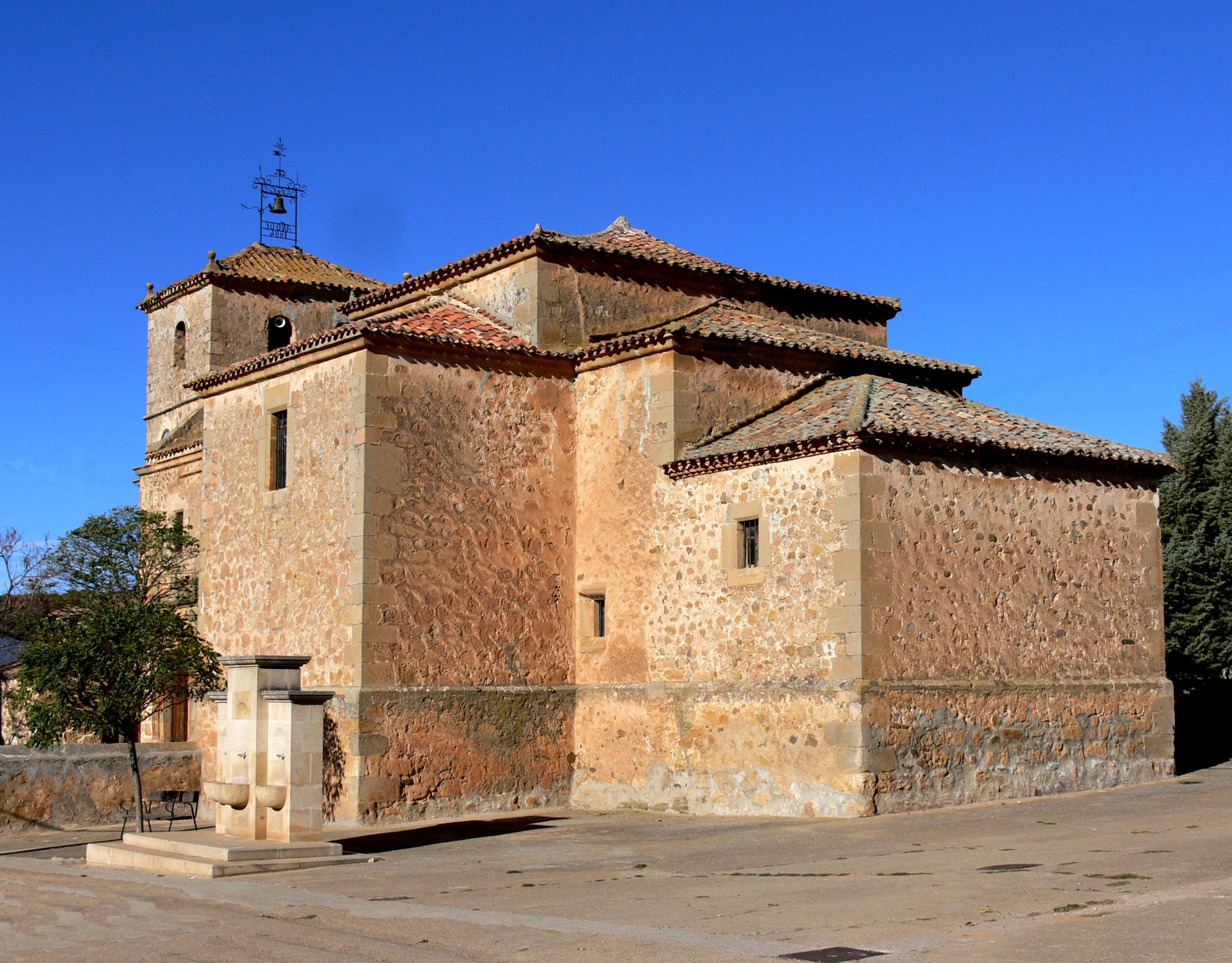 Iglesia de San Martín (sXIX).